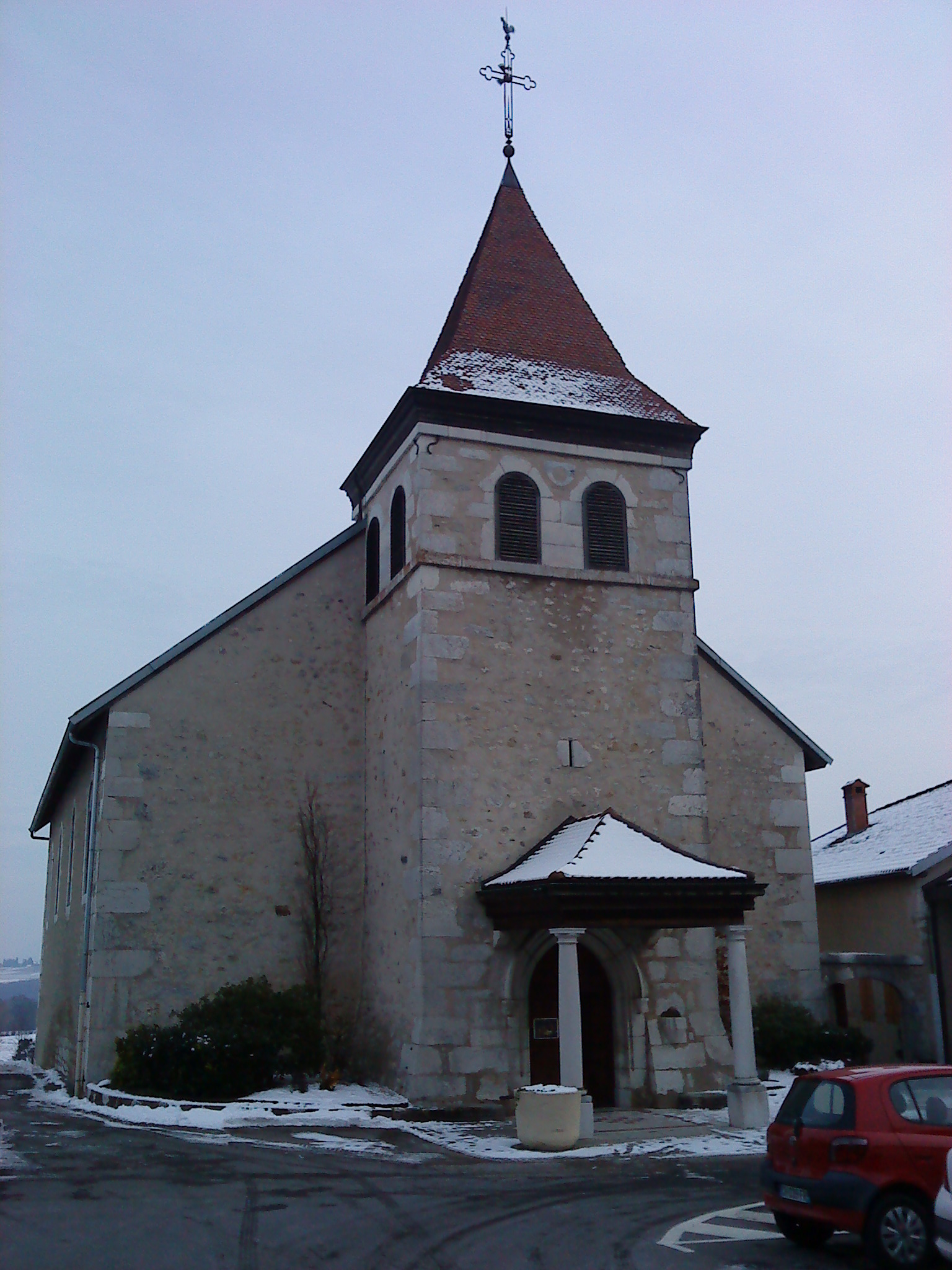 Église Saint-Maurice de Thoiry, Ain, France